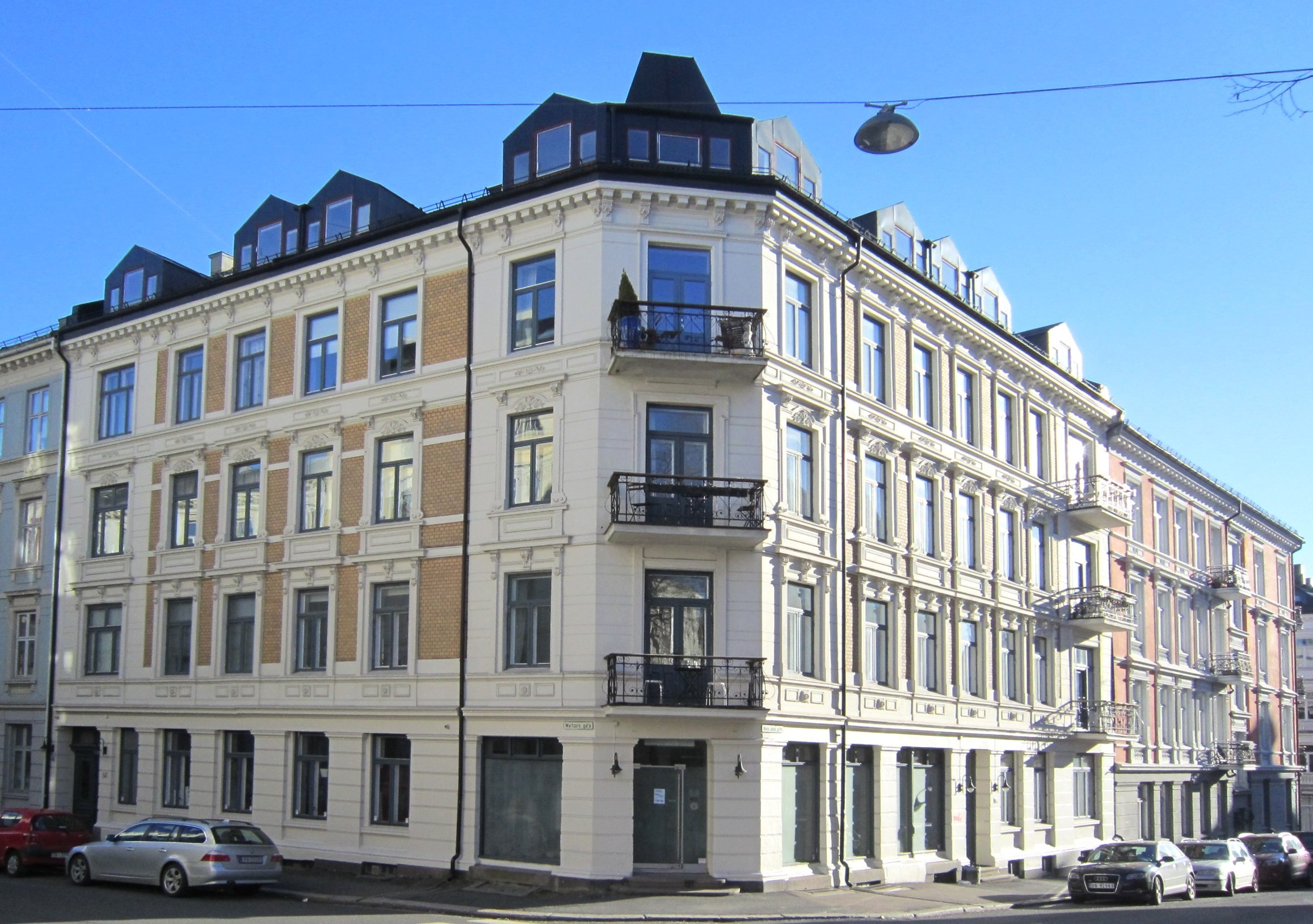 Niels Juels gate 43 (ark. Olaf Boye)